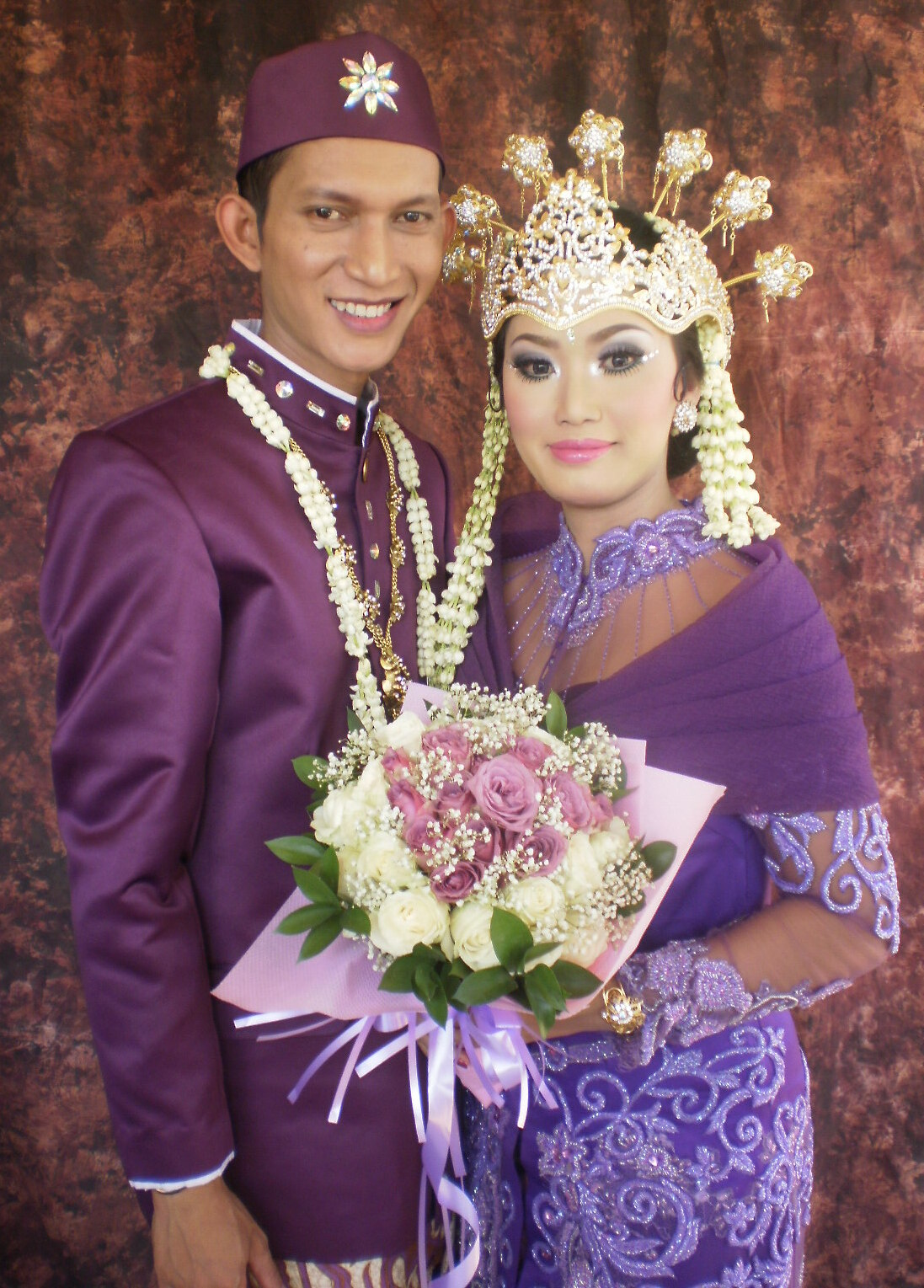 pernikahan by latifah payet